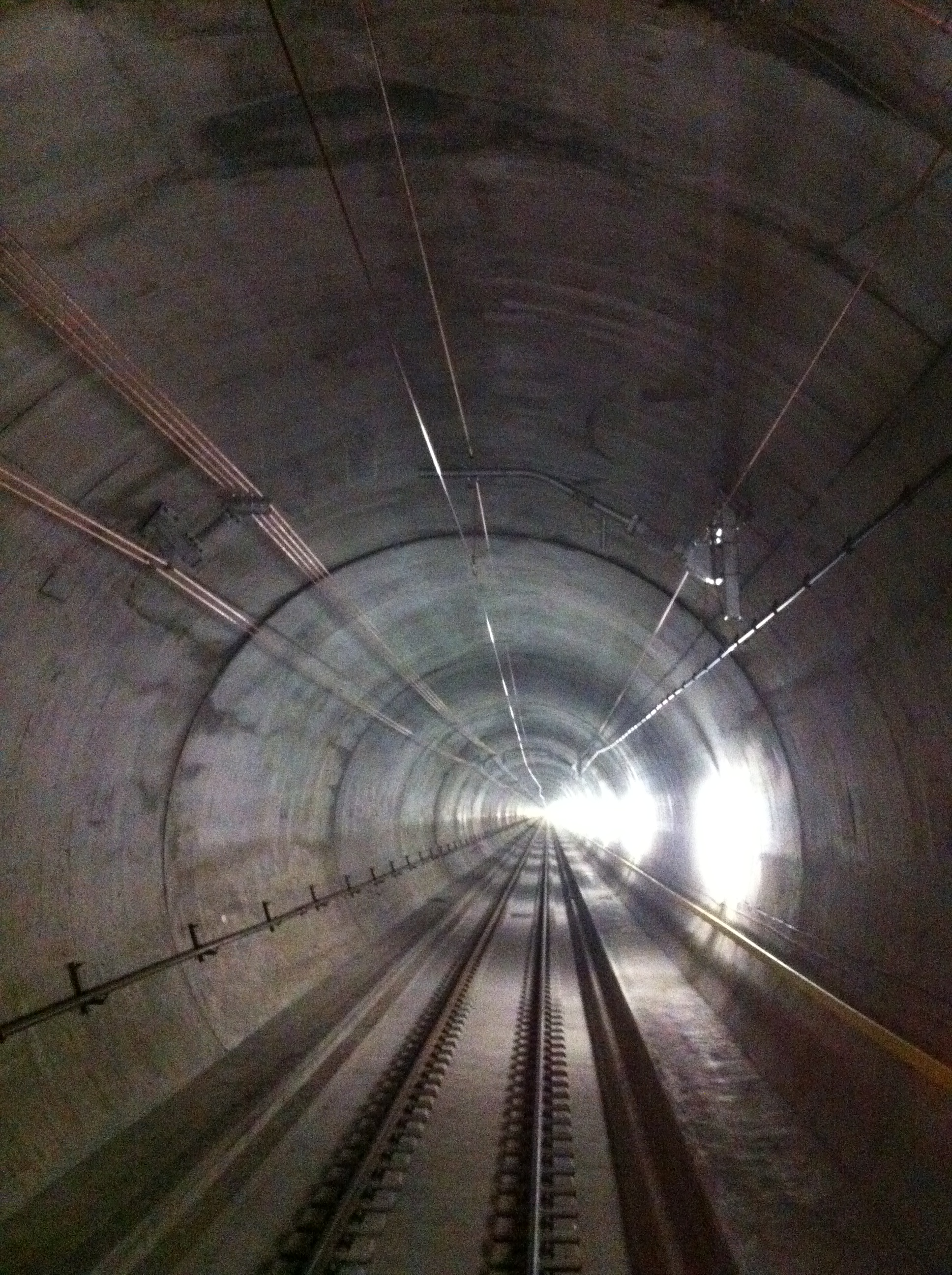 Réalisation des équipements ferroviaires dans le tronçon Faido-Bodio du tube Ouest